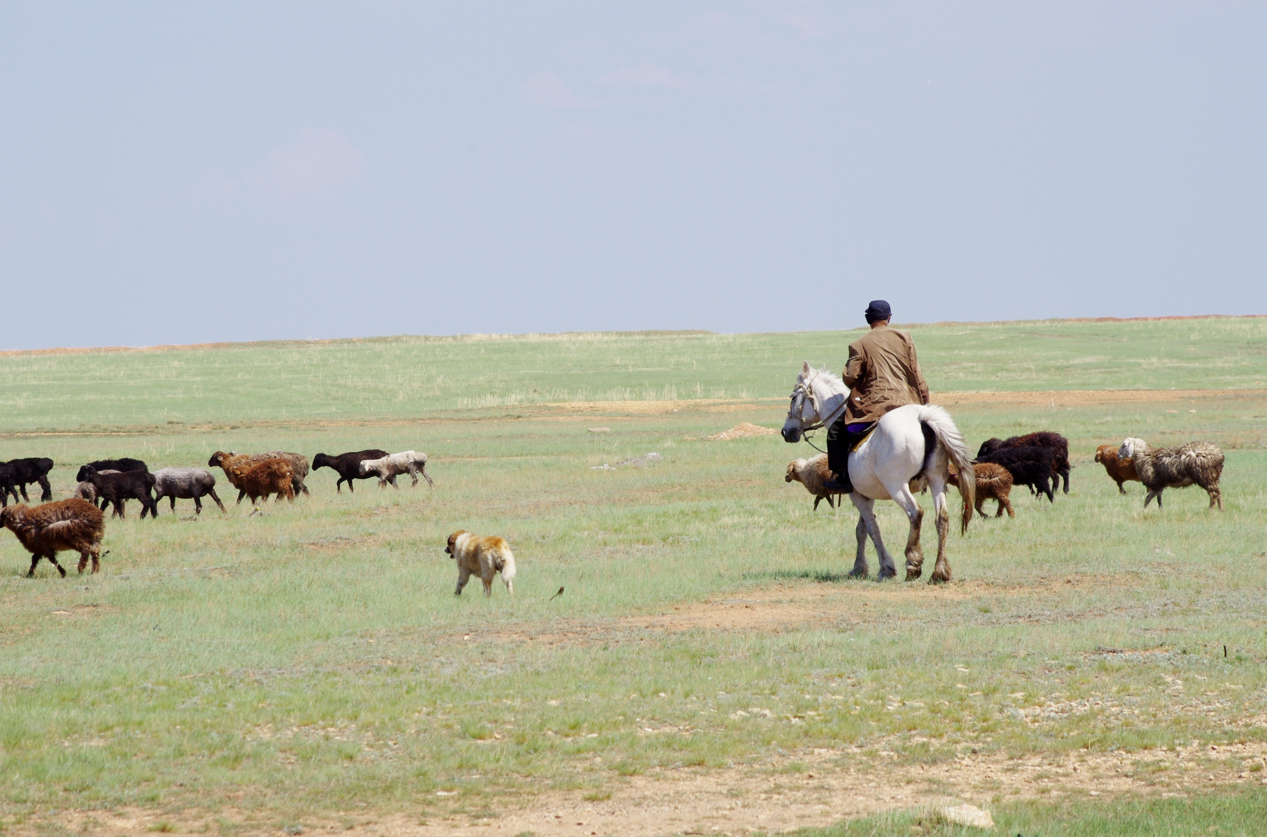 Kazakhstani Cowboy Herding His Sheep